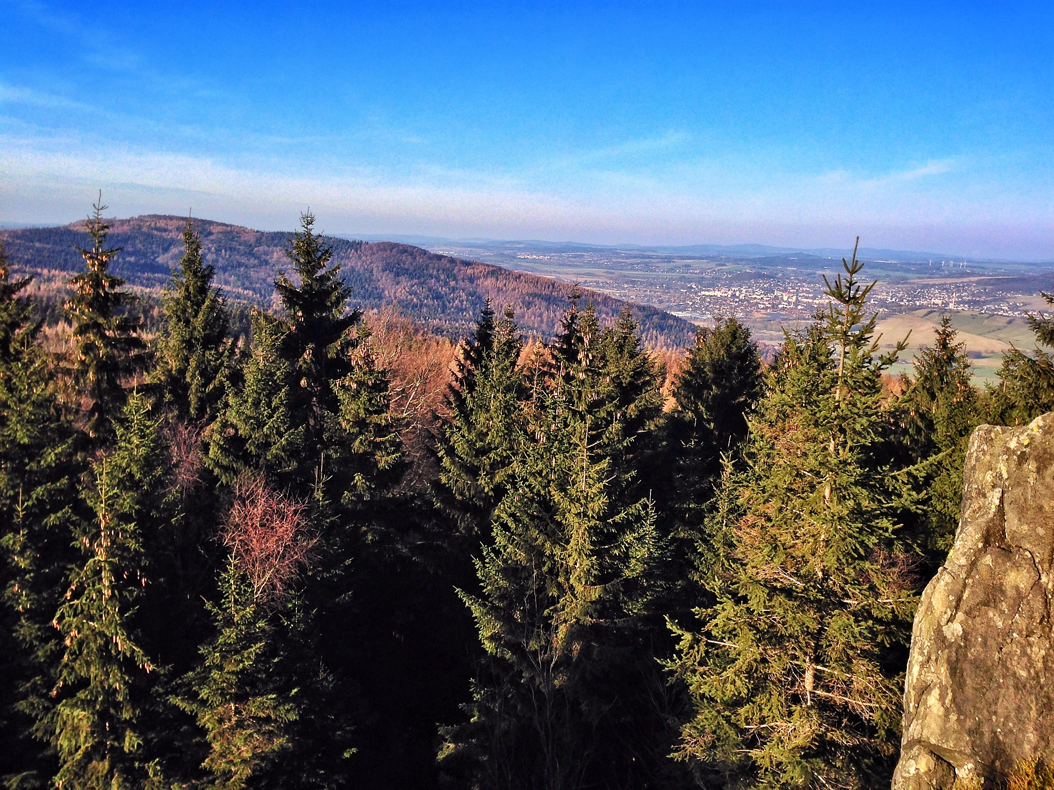 Weberberg z Luže, vpravo v pozadí Varnsdorf.